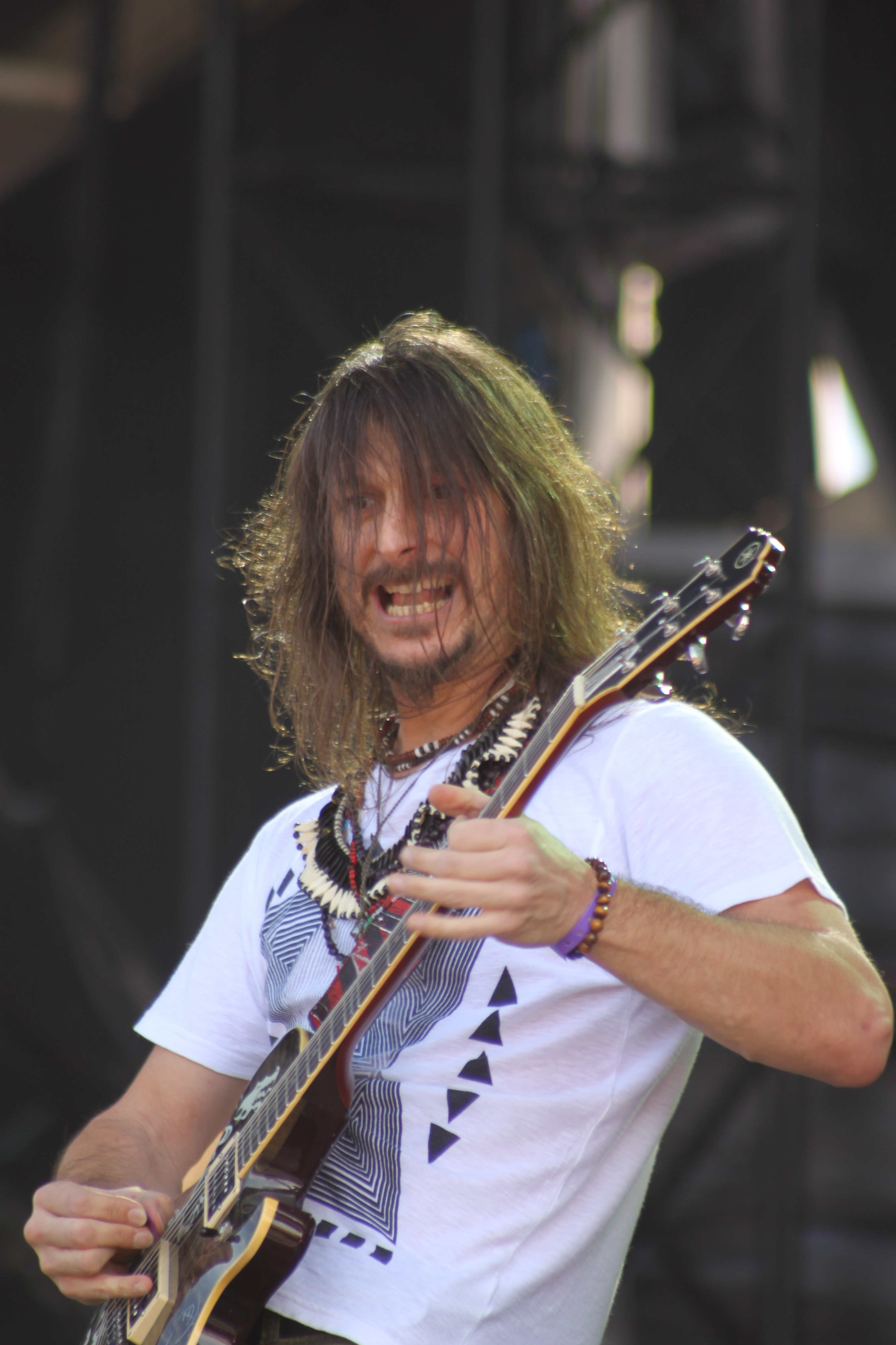 Hellfest 2014. Rafael Bittencourt, Angra. Fr-44-Clisson.